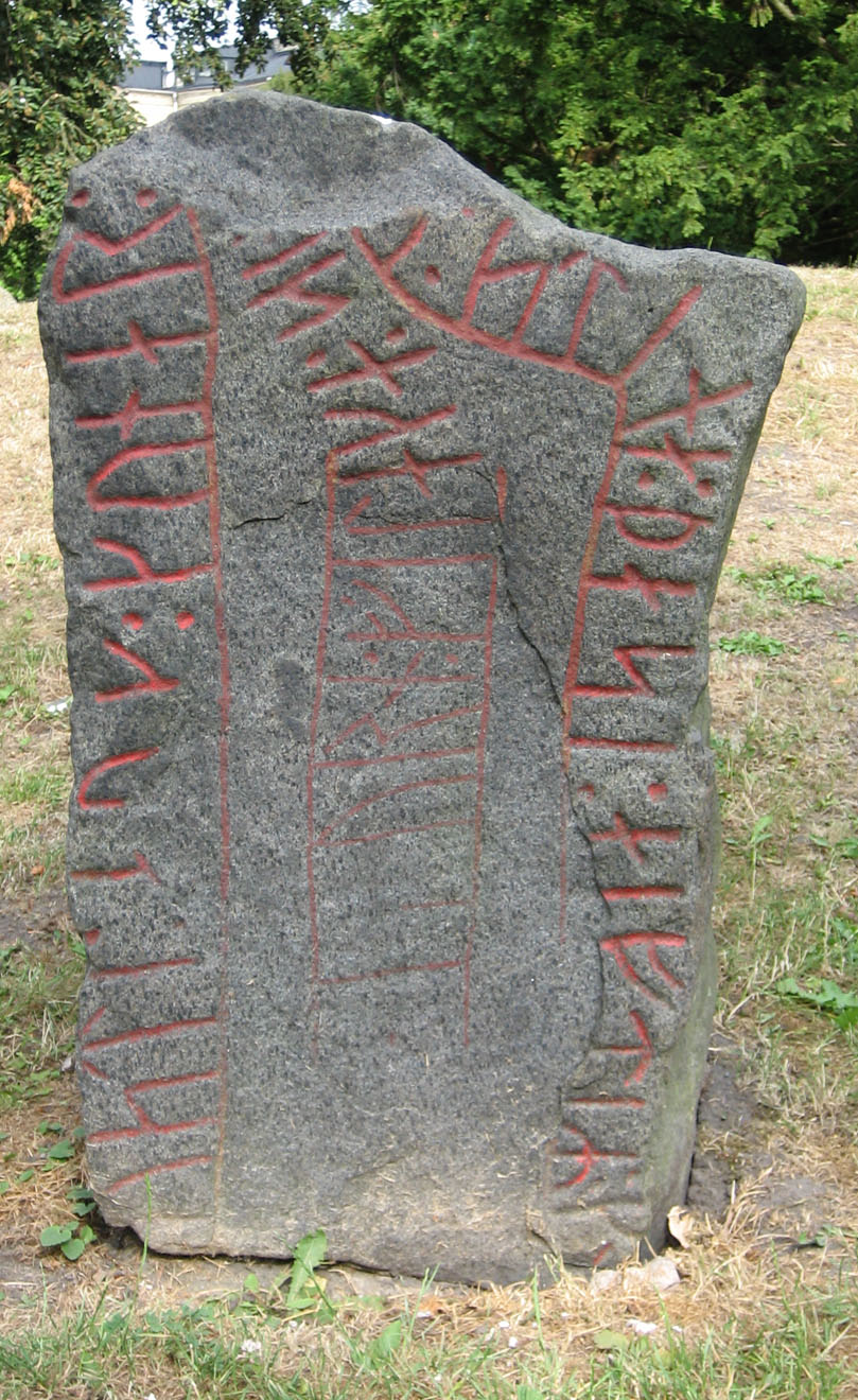 The Gårdstånga runestone (no 2), Lund, Sweden. Photo taken summer 2006.